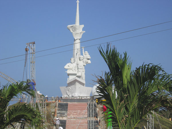 Открытие в Камрани мемориального комплекса, посвященного памяти советских, российских и вьетнамских военнослужащих, отдавших жизнь за мир и стабильность в регионе.